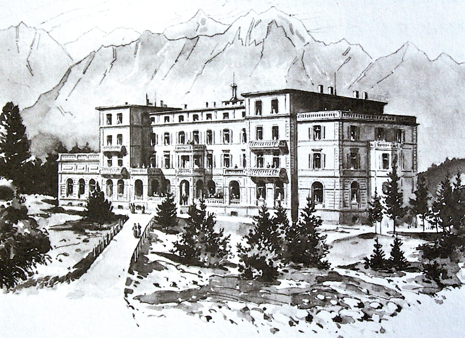 Hotel Waldhaus Flims nach der Eröffnung 1877